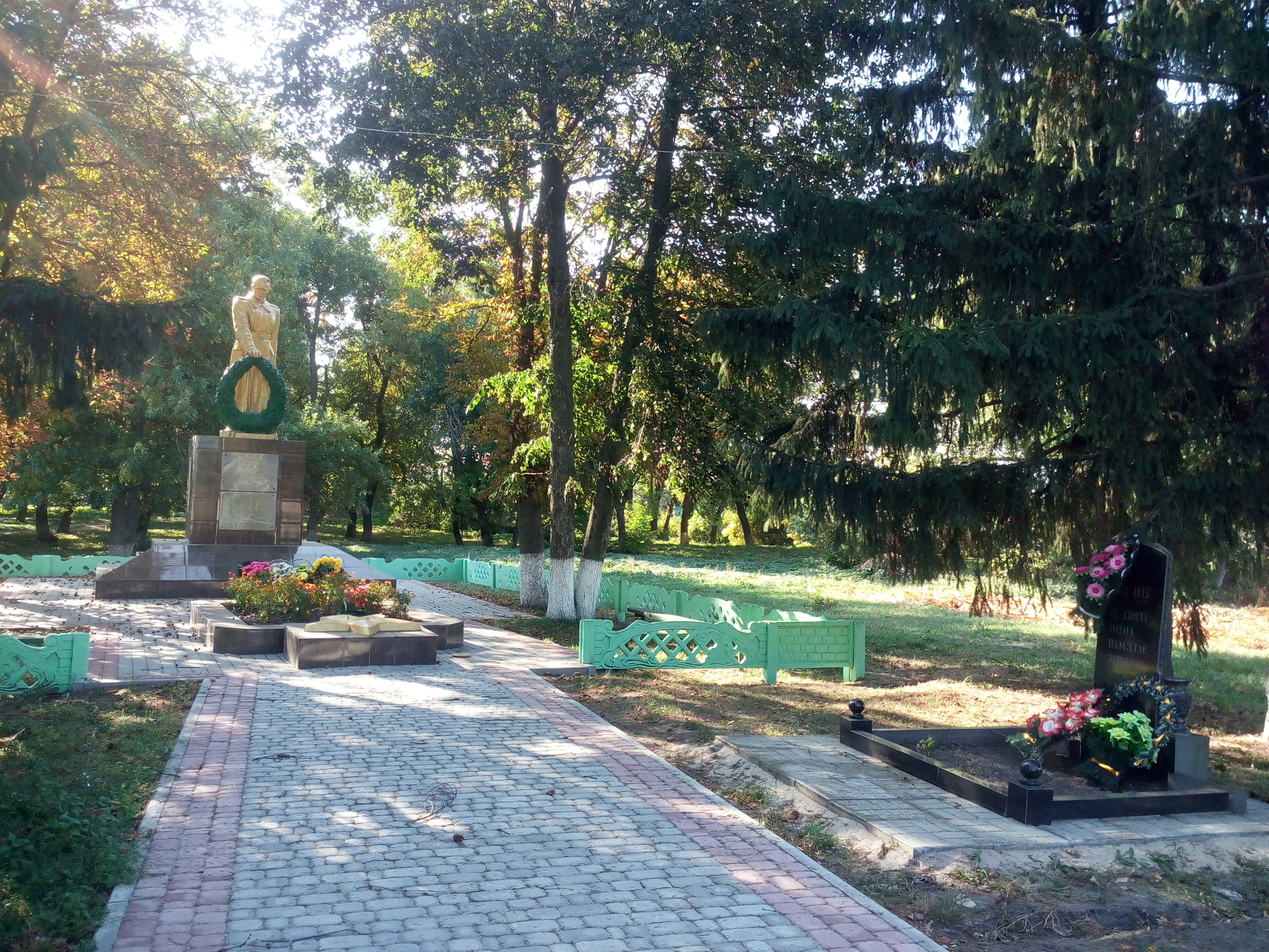 Братська могила радянських воїнів. Поховано 1009 воїнів., Колонтаїв